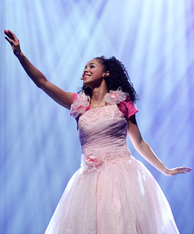 Heerlen